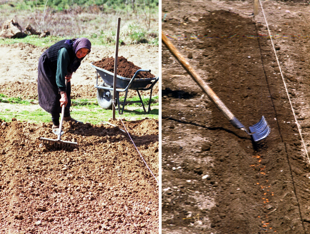 Употреба грабуља. Расадник Наупаре, Србија (аутор: Михаило Грбић).